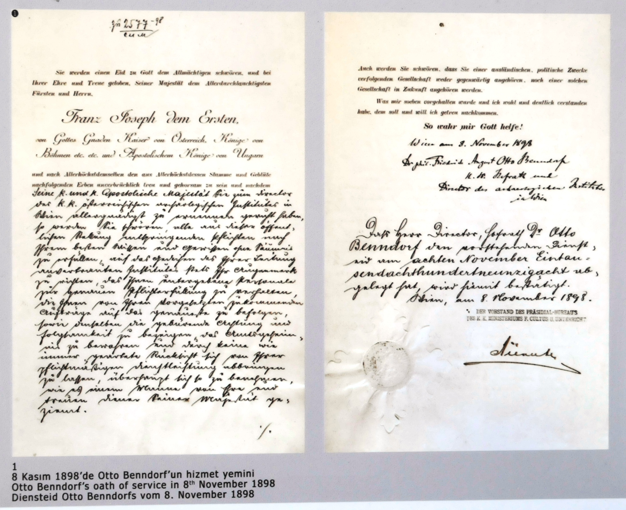 Diensteid von Otto Benndorf vom 8. November 1888, ausgestellt im Ausgrabungsgelände von Ephesus